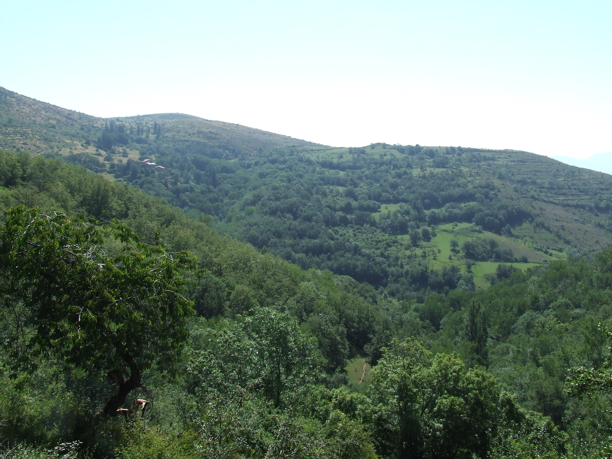 Larén i el Ban de Larén (Senterada, Pallars Jussà)